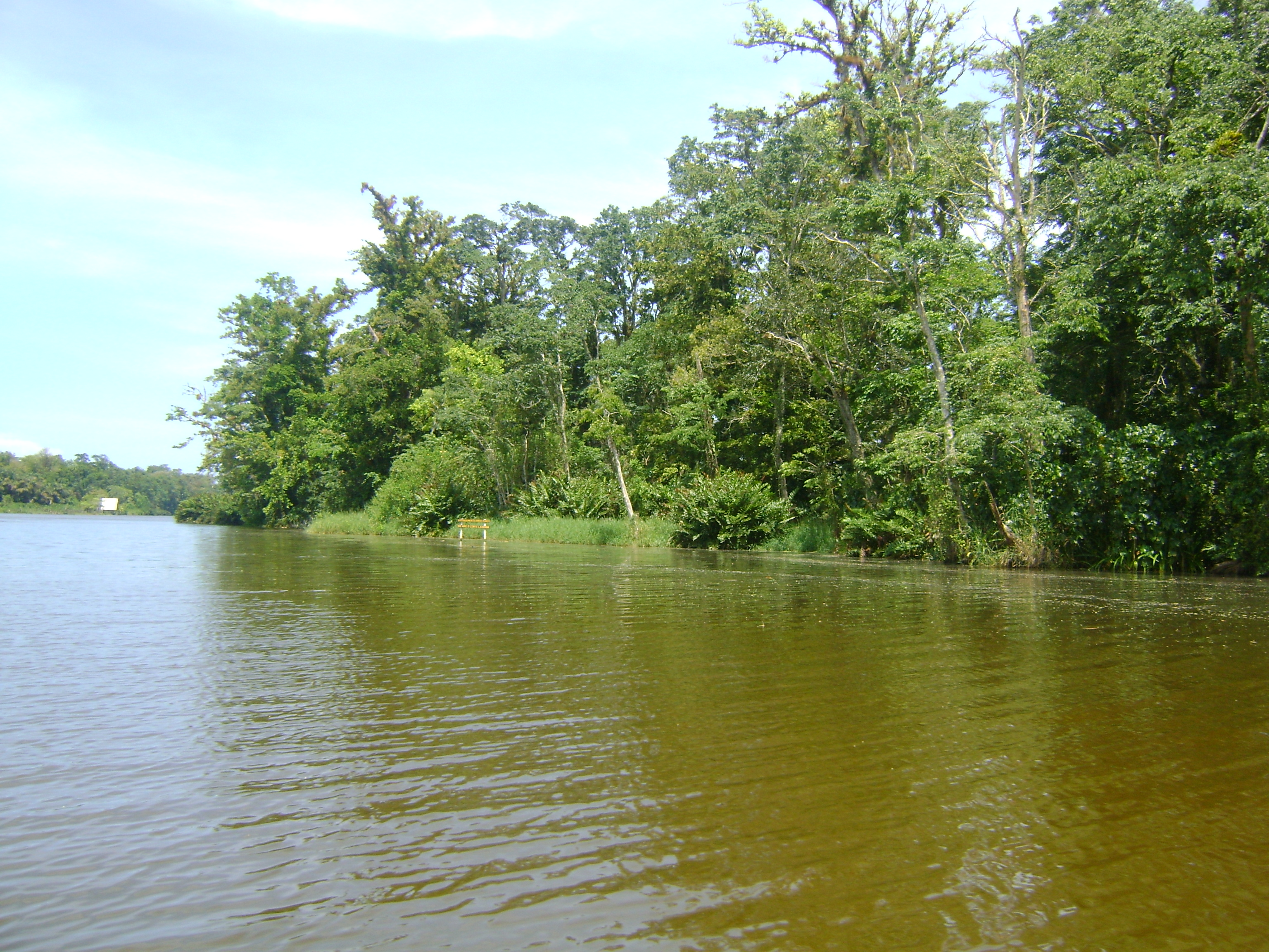 Río San San Bocas del Toro, Panamá. Humedal de San San Pond Sak